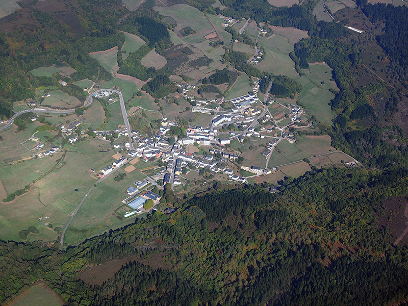 OLYMPUS tomas aérea